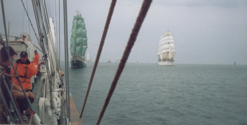 Zdjęcie z pokładu ORP Iskra od załoganta. 22 lipca 2003r. Licencja: GNU FDL.